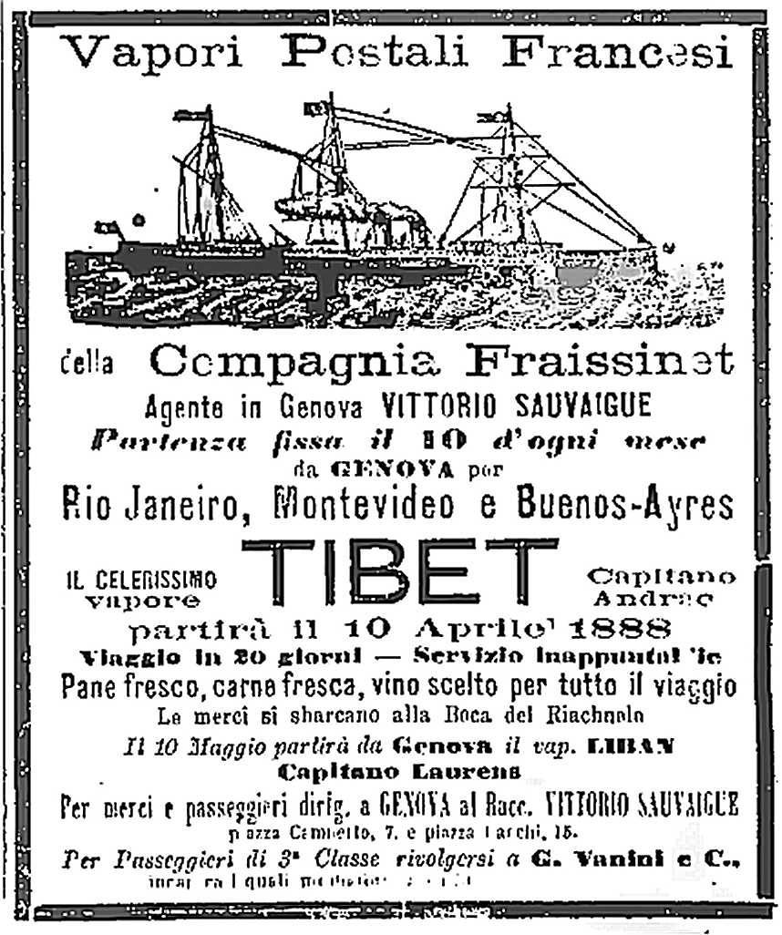 Inserzione pubblicitaria del 19.3.1888 su la Gazzetta provinciale di Bergamo, Italia, della francese Compagnia Fraissinet, agente in Genova Vittorio Sauvaigue - il celerissimo vapote TIBET partirà il 10.4.1888 da Genova per Rio de Janeiro, Montevideo e Buenos Ayres - il 10.5.1888 partirà il vapore LIBAN